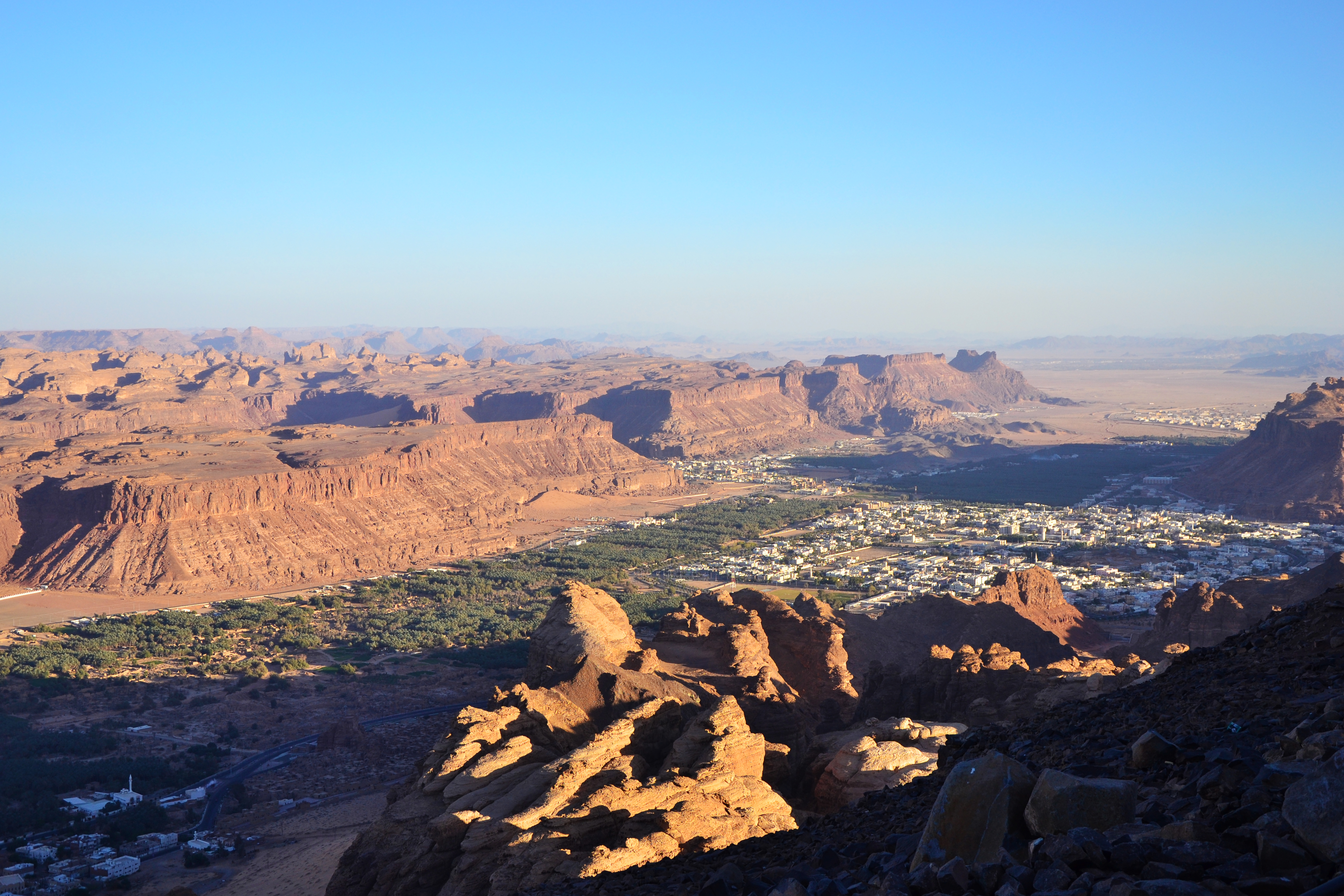 Al Ula